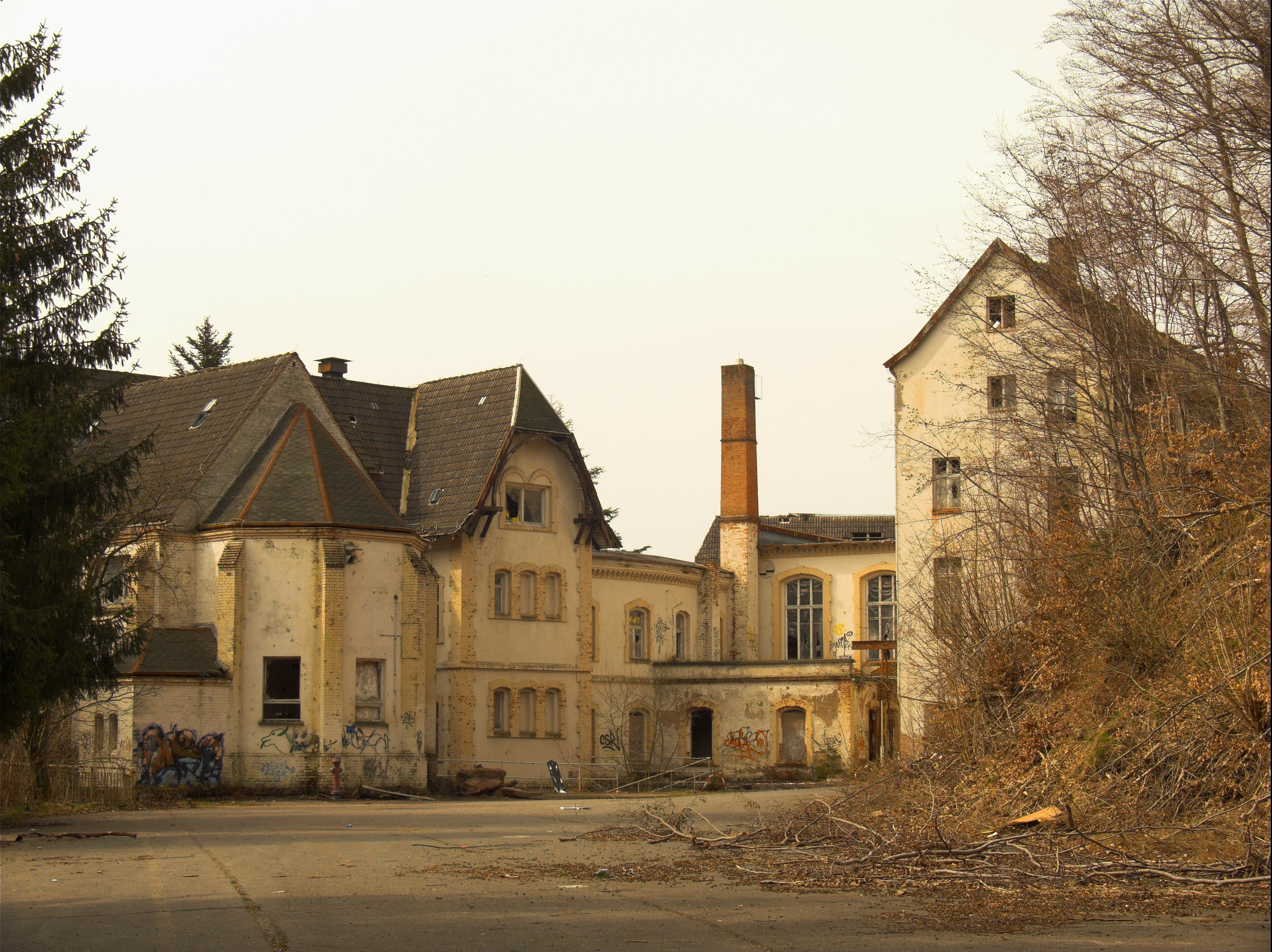 Ehemaliges Knappschaftssanatorium auf dem kleinen Steierberg bei Sülzhayn